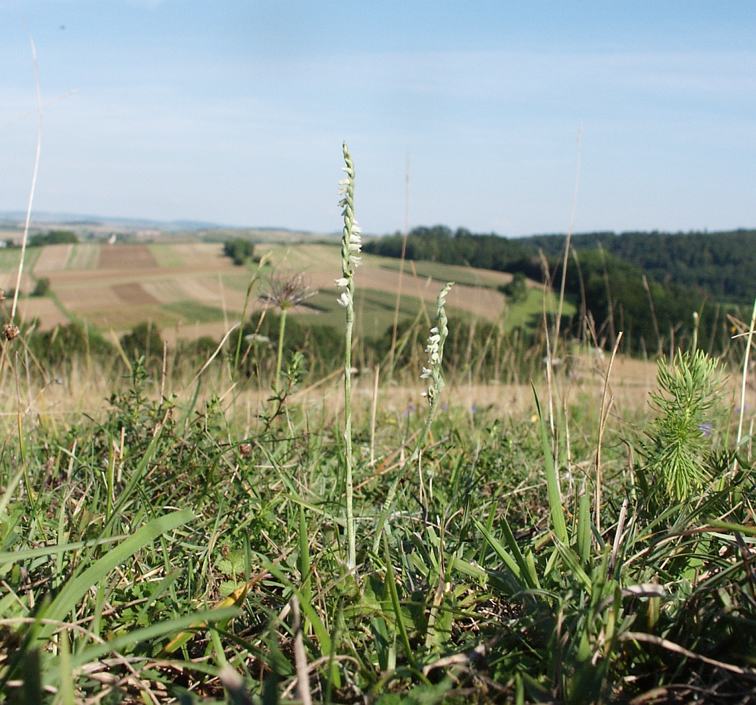 Spiranthes spiralis, Nördlinger Ries, Germany